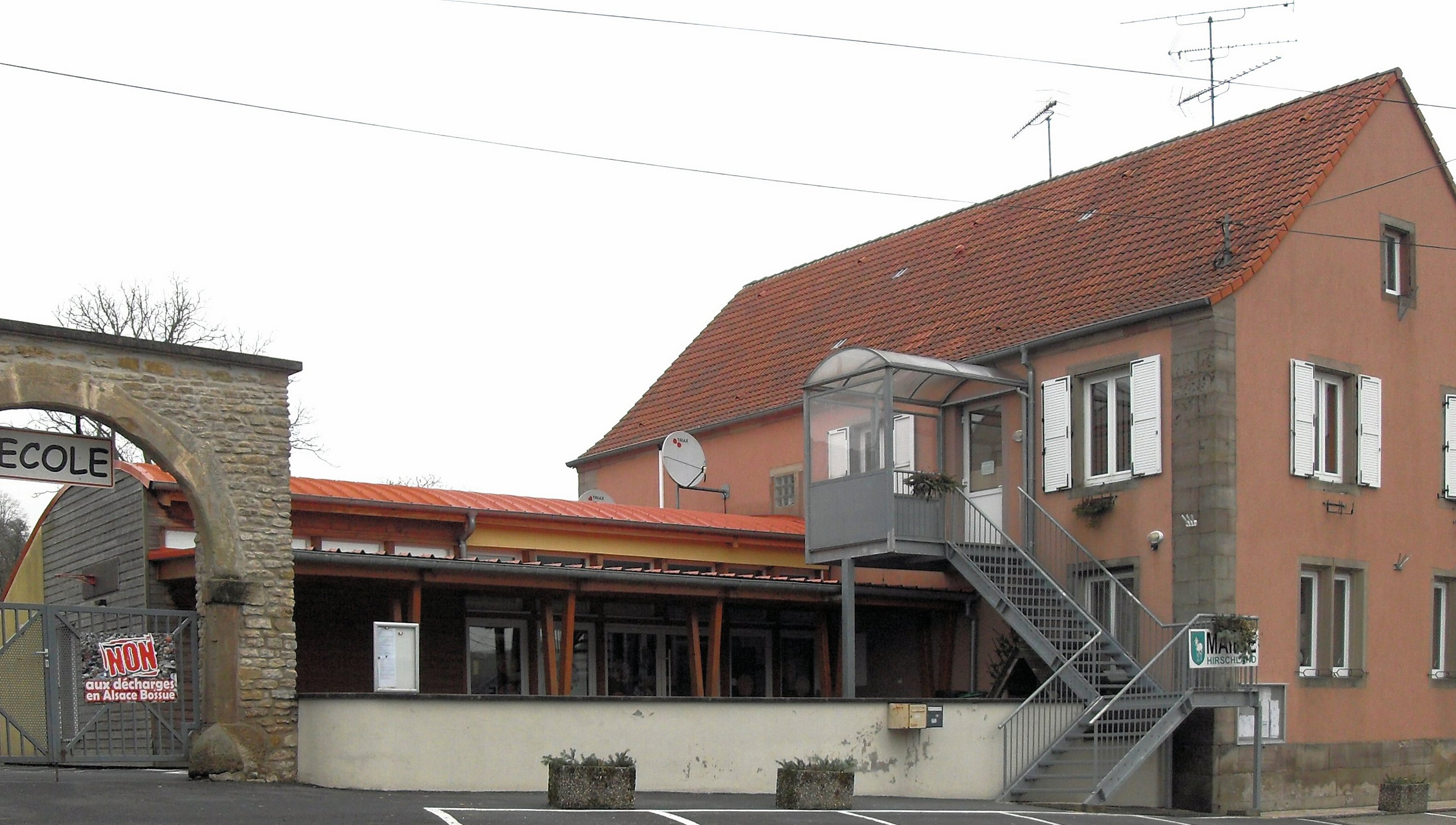 La mairie et l'école à Hirschland